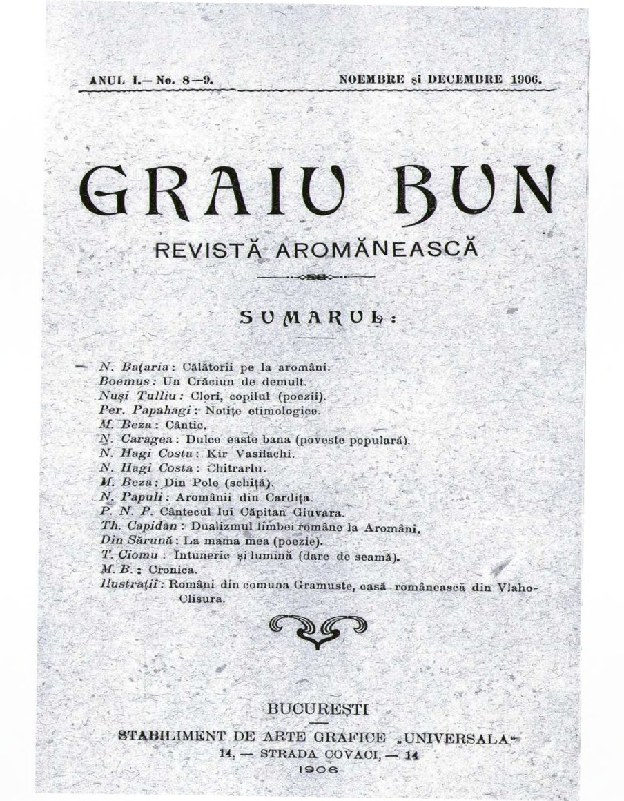 Граиу Бун, 1906, №8-9